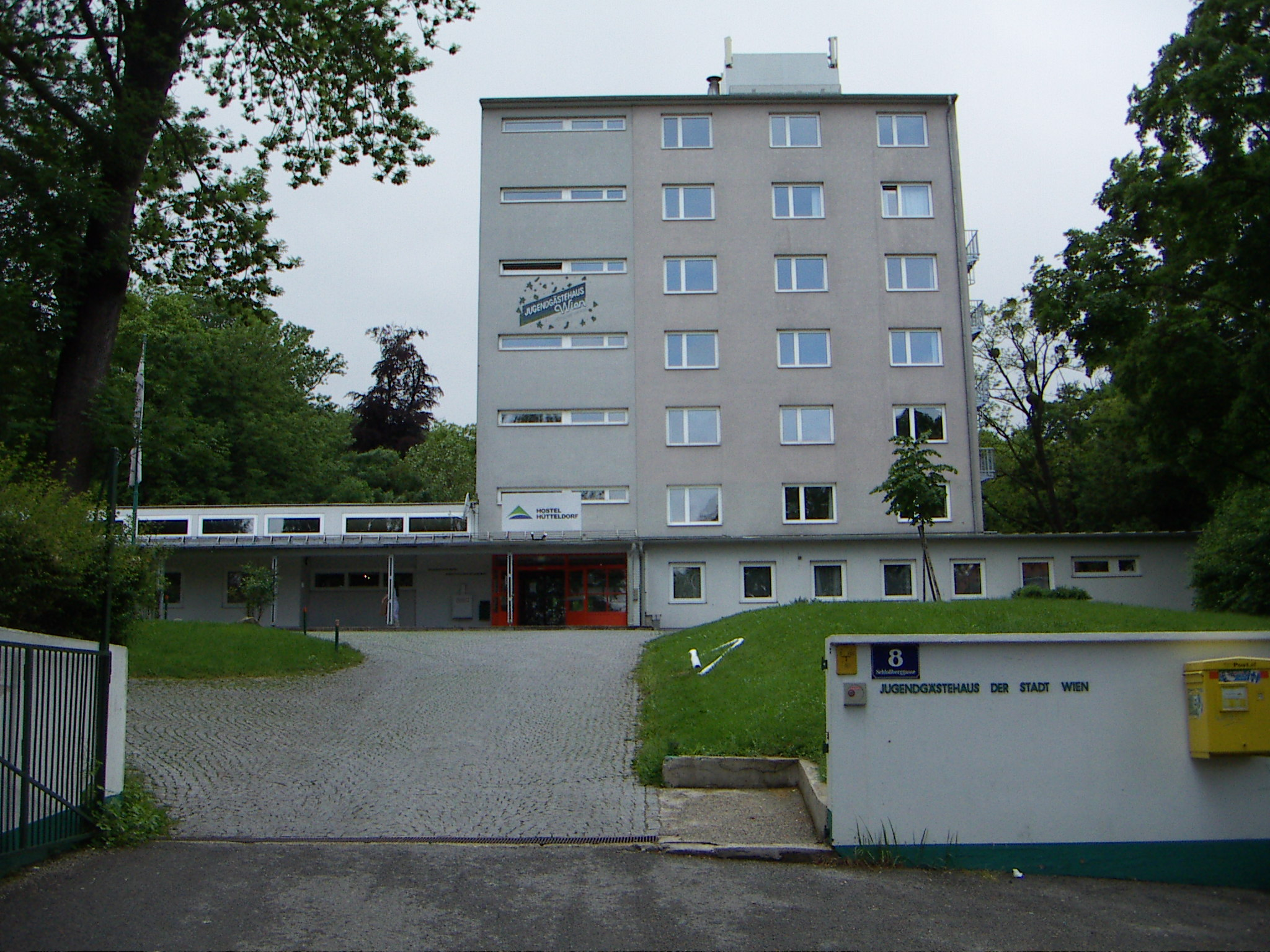 Jugendgästehaus Hütteldorf-Hacking Schloßberggasse 8 1130 Wien, Architekt Fred Freyler